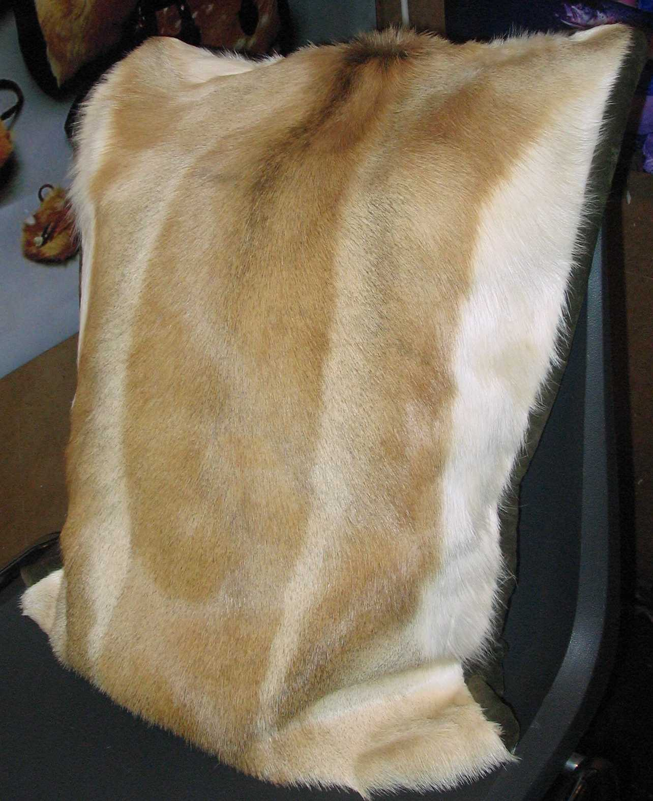 Kissen aus dem Fell einer indischen Antilope. Gesehen auf der Messe „Jagd und Hund“, 29. Januar bis 3. Februar 2013.